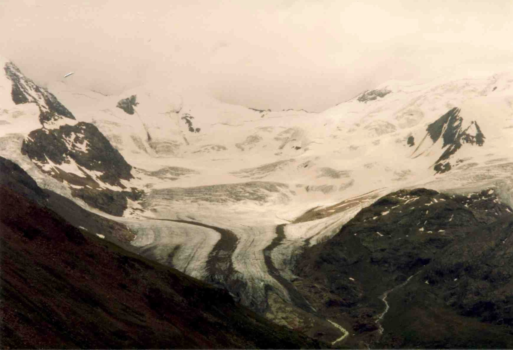 Vedretta dei Forni vista dalla Val Cedec Valfurfa (SO)